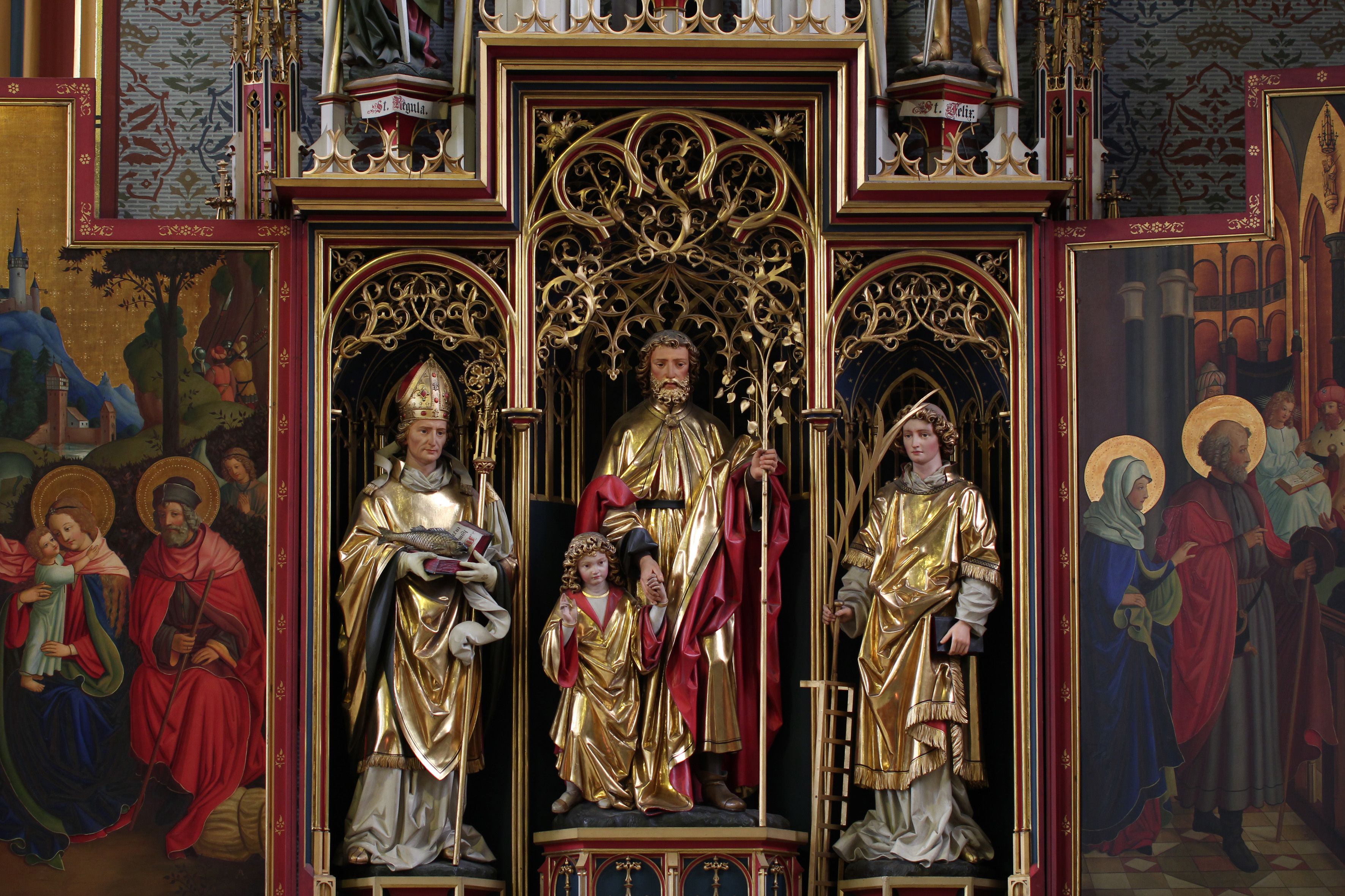 Römisch-katholische Pfarrkirche St. Peter und Paul Winterthur-Neuwiesen, Josephaltar Detail